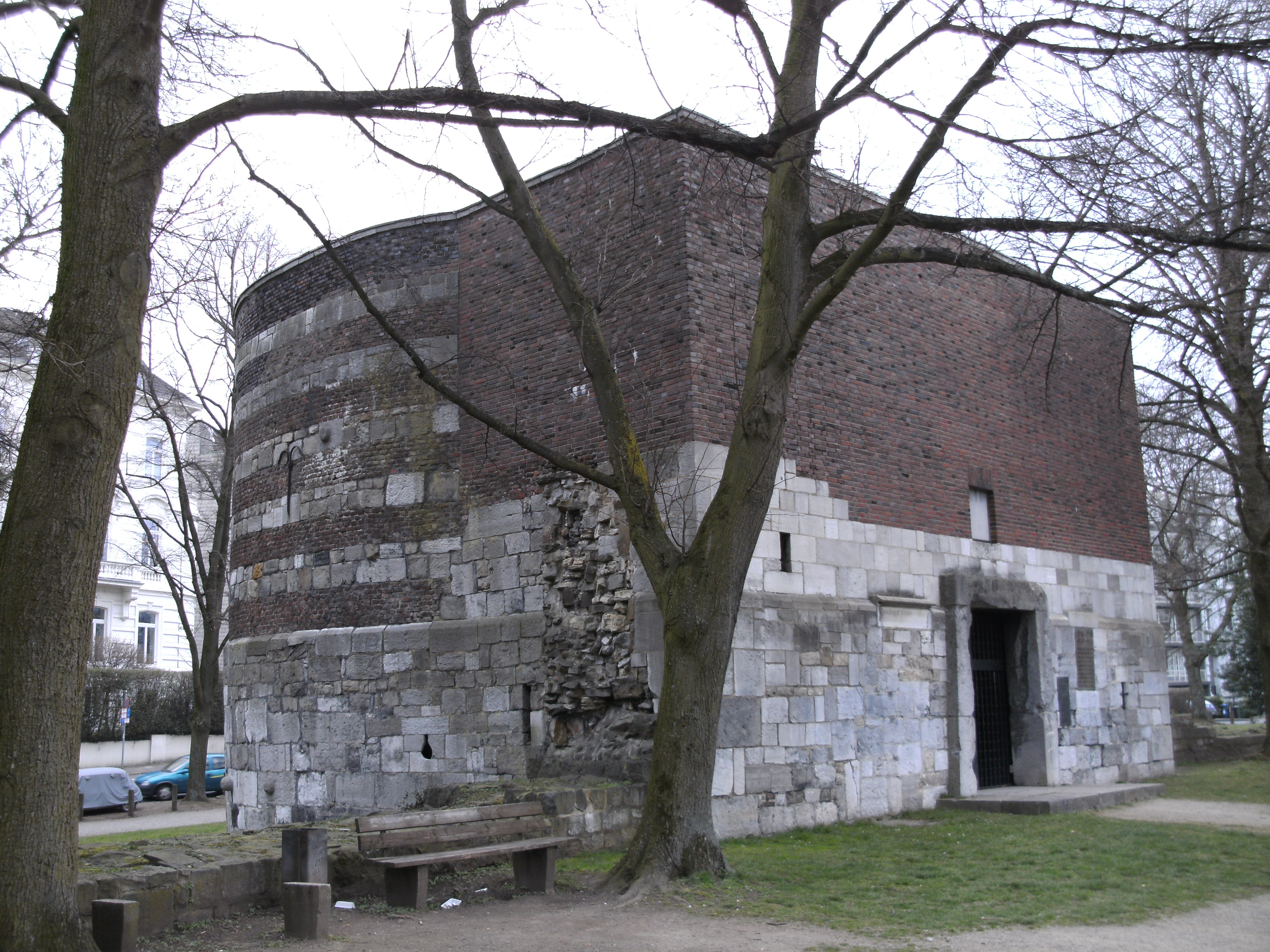 Marienburg Aachen